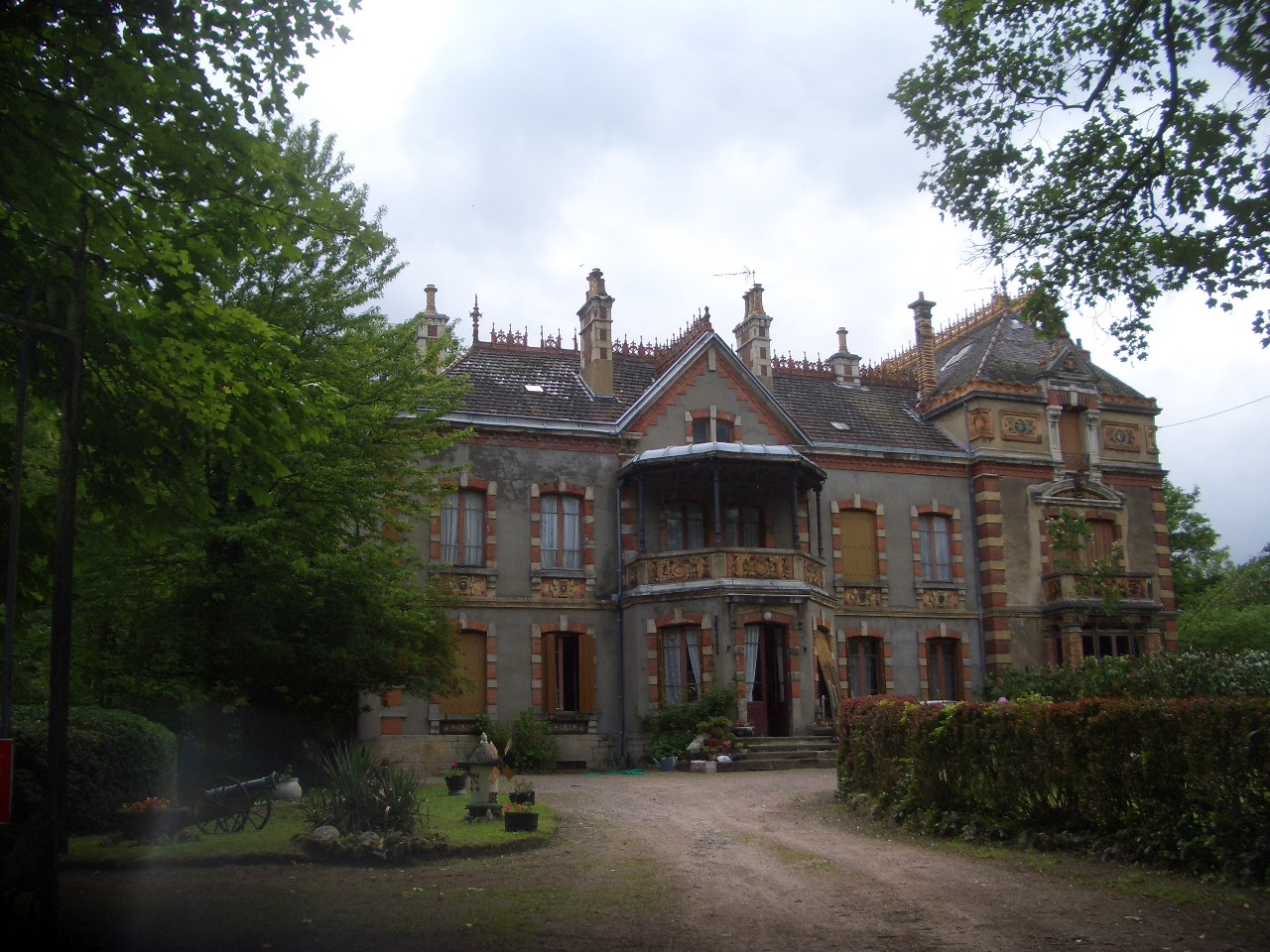 Maison Perrusson